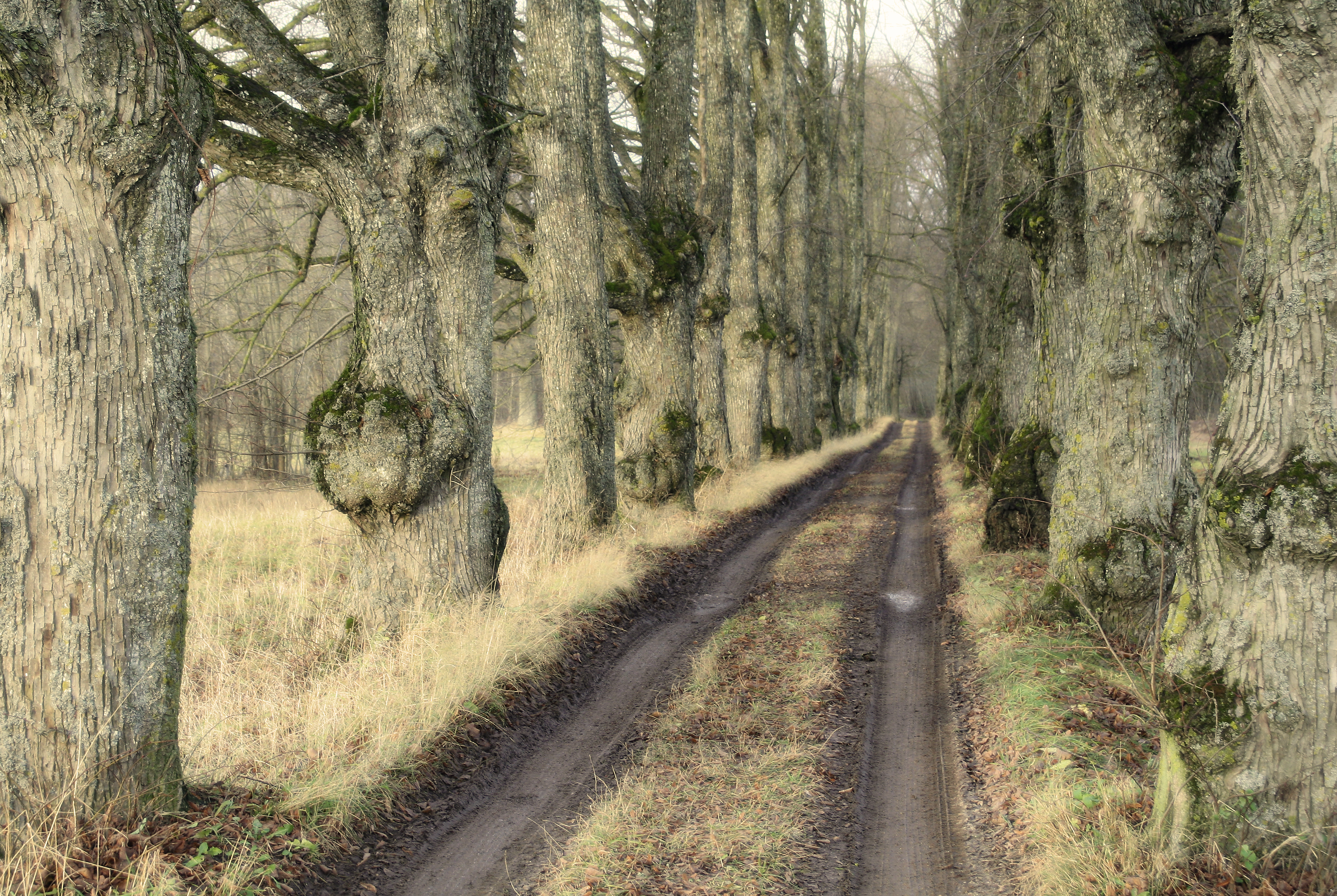 Aleja uz kapiem Jaunpils pusē